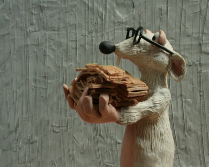 Klatka z filmu Tadzik kładzie panele autorstwa Moniki Kuczynieckiej.